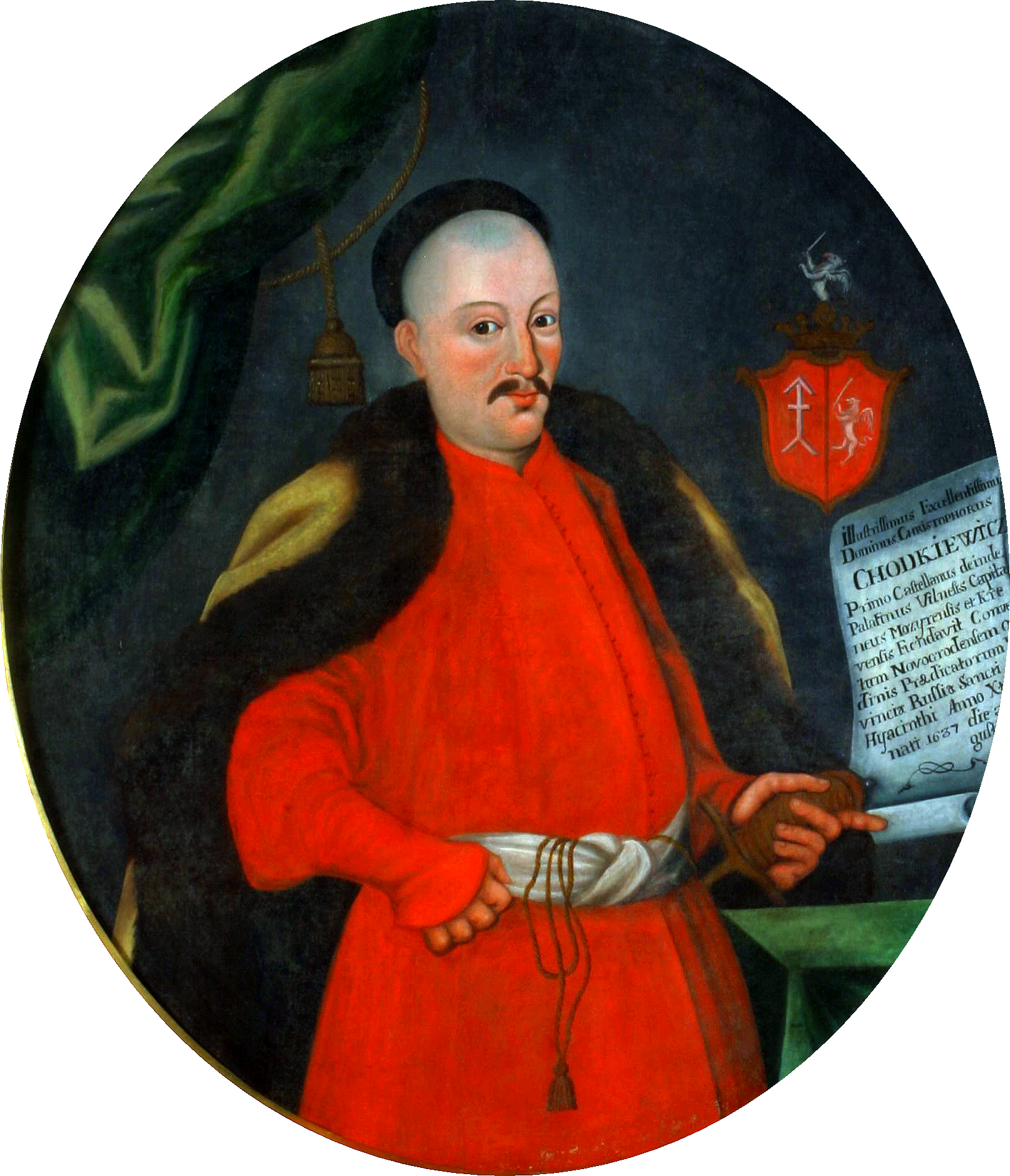 Krzysztof Chodkiewicz